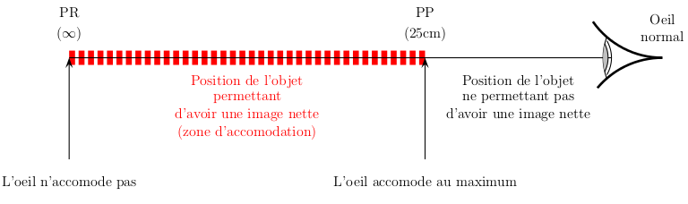 Accommodation